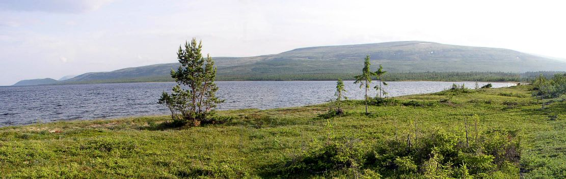 Północny brzeg Umbozera.